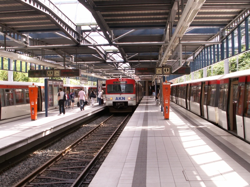 AKN Bahn 2007